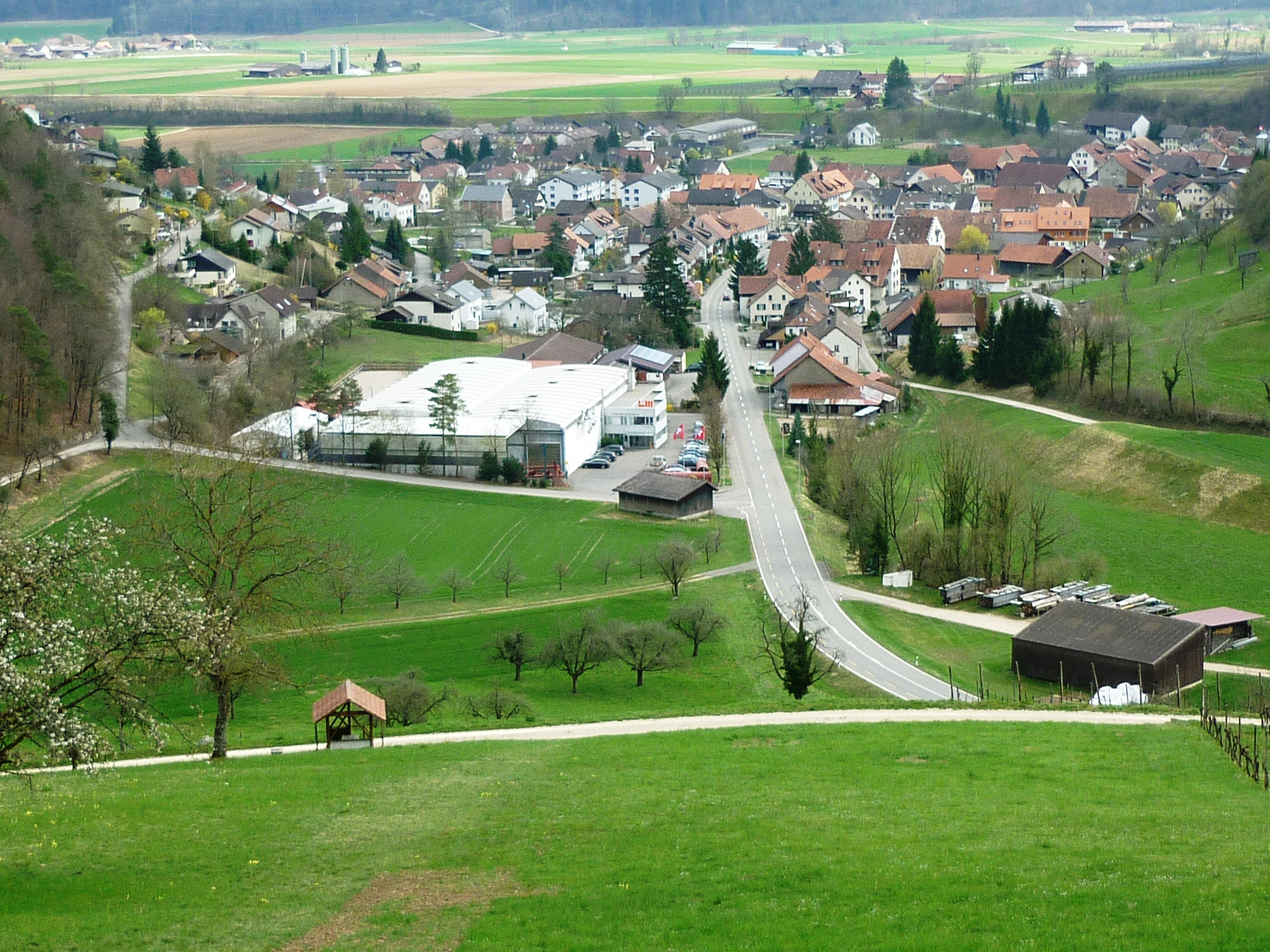 Remigen AG, Schweiz